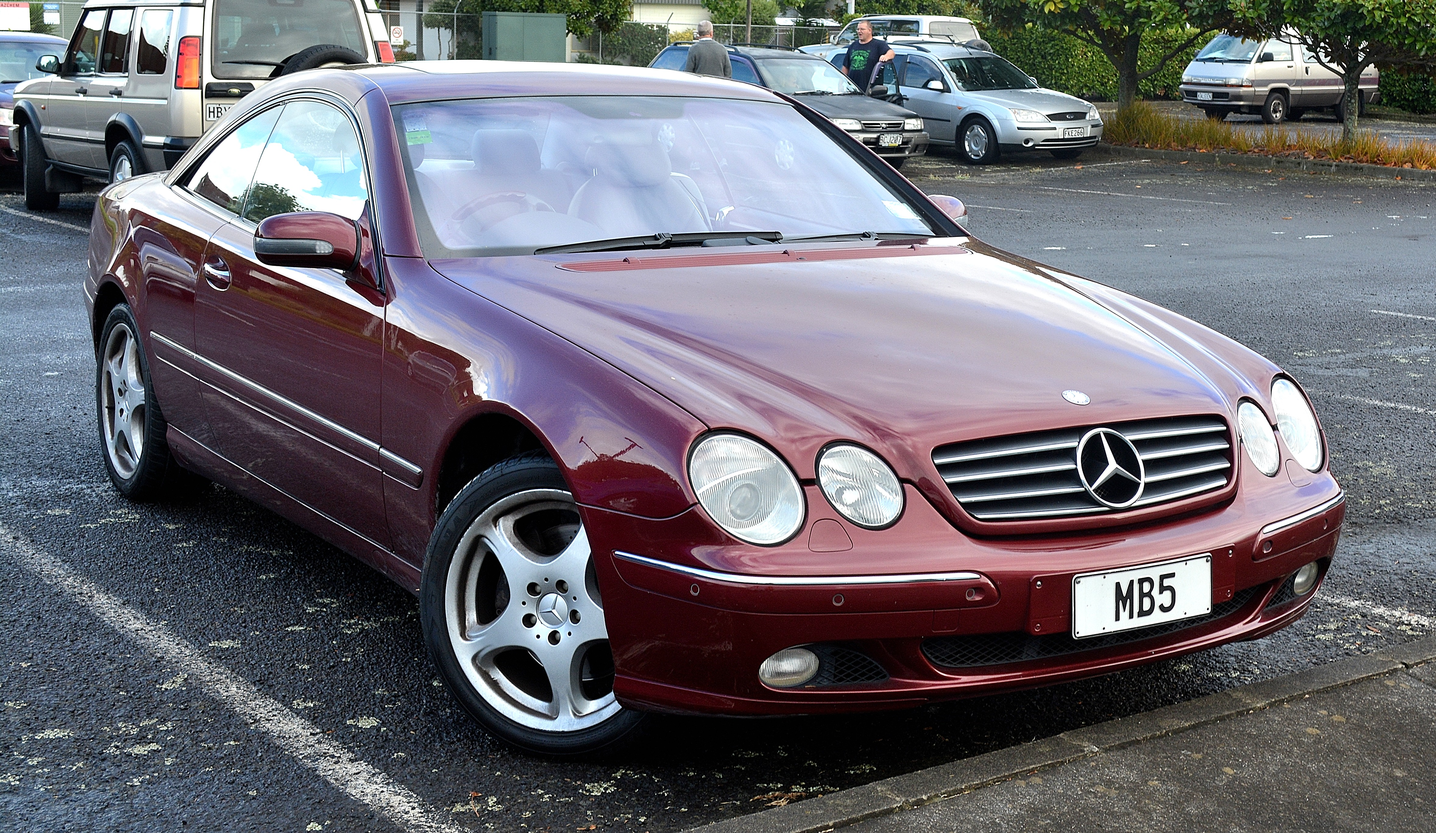 2000 Mercedes-Benz CL500